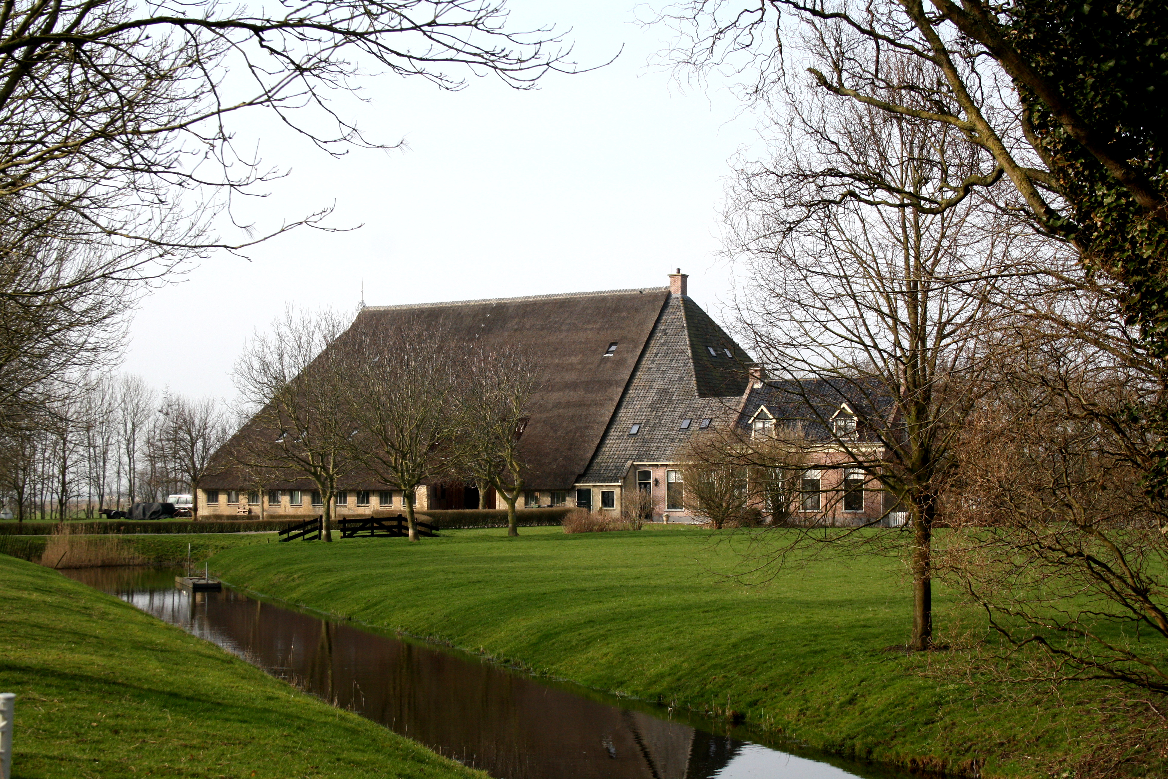 Boerderij Camminghastate uit 1886 - van Camminghaweg 34 in Arum (Friesland)